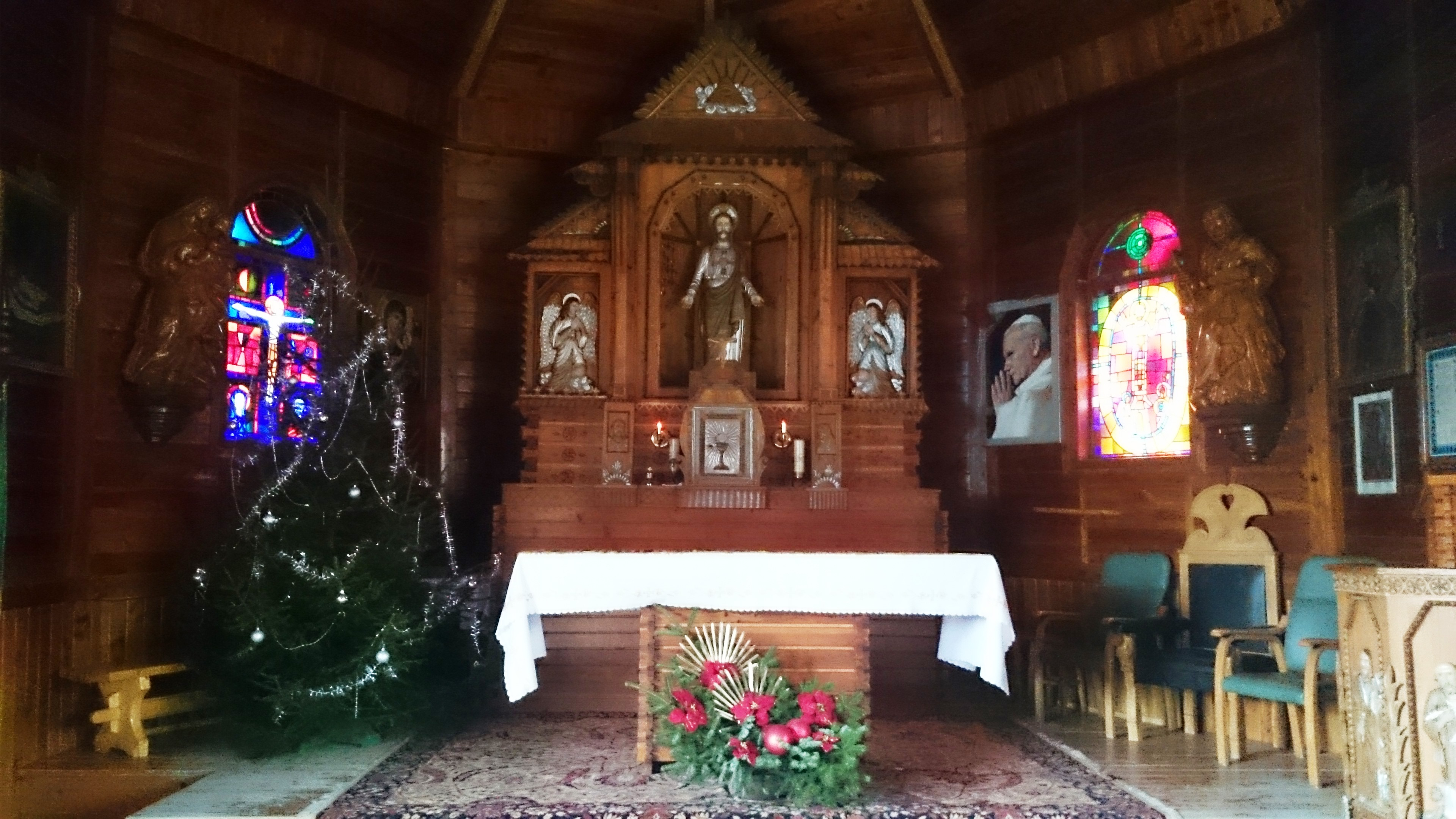 Ołtarz w kościele Najświętszego Serca Pana Jezusa w Szczawie